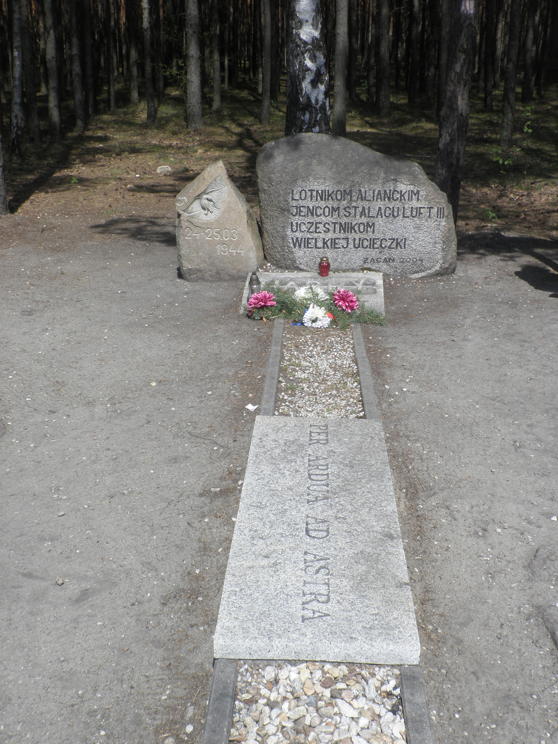 Museum of Allied Prisoners of War Martyrdom in Żagań (Sagan)